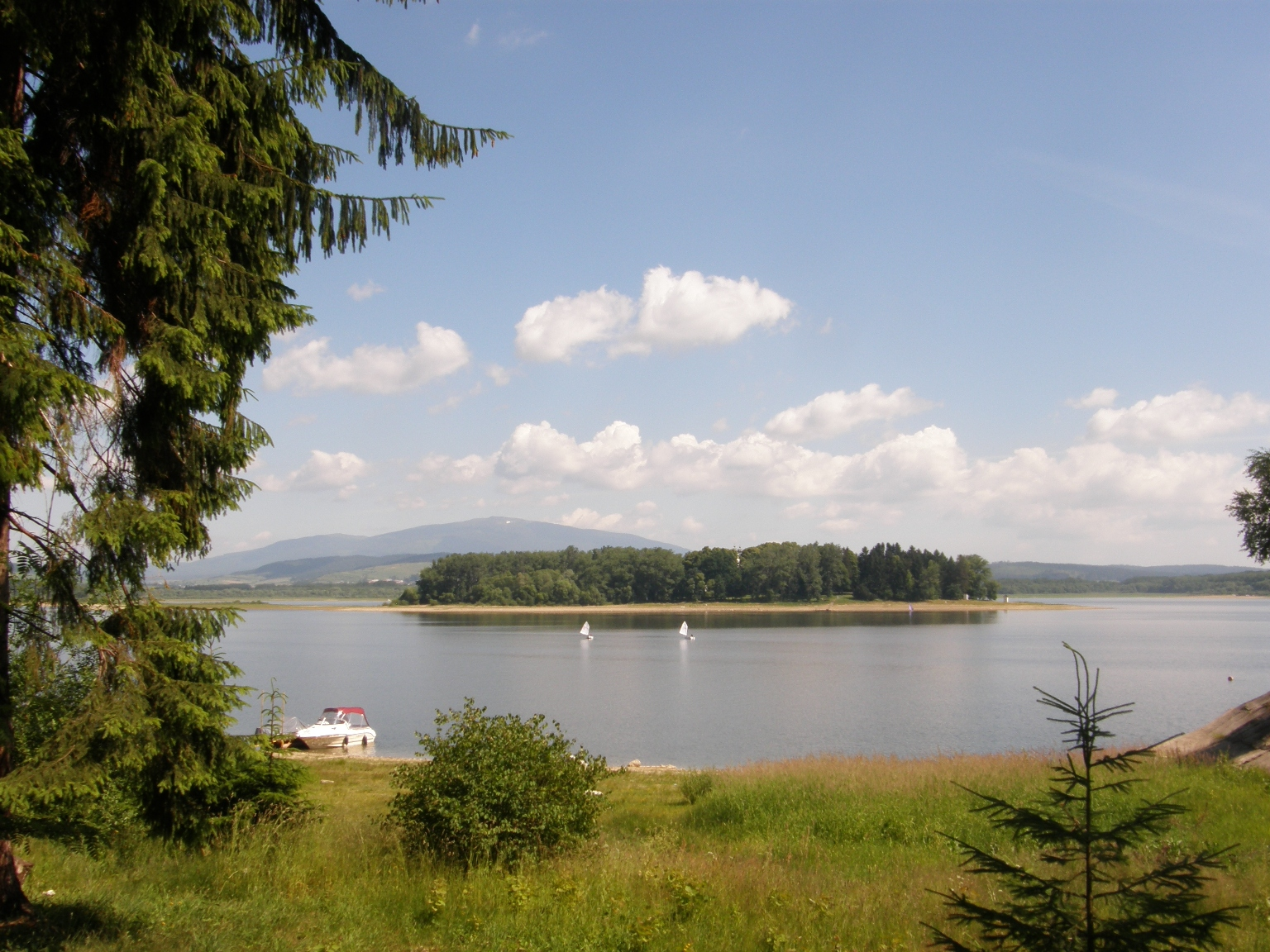 Obľúbené výletné miesto.